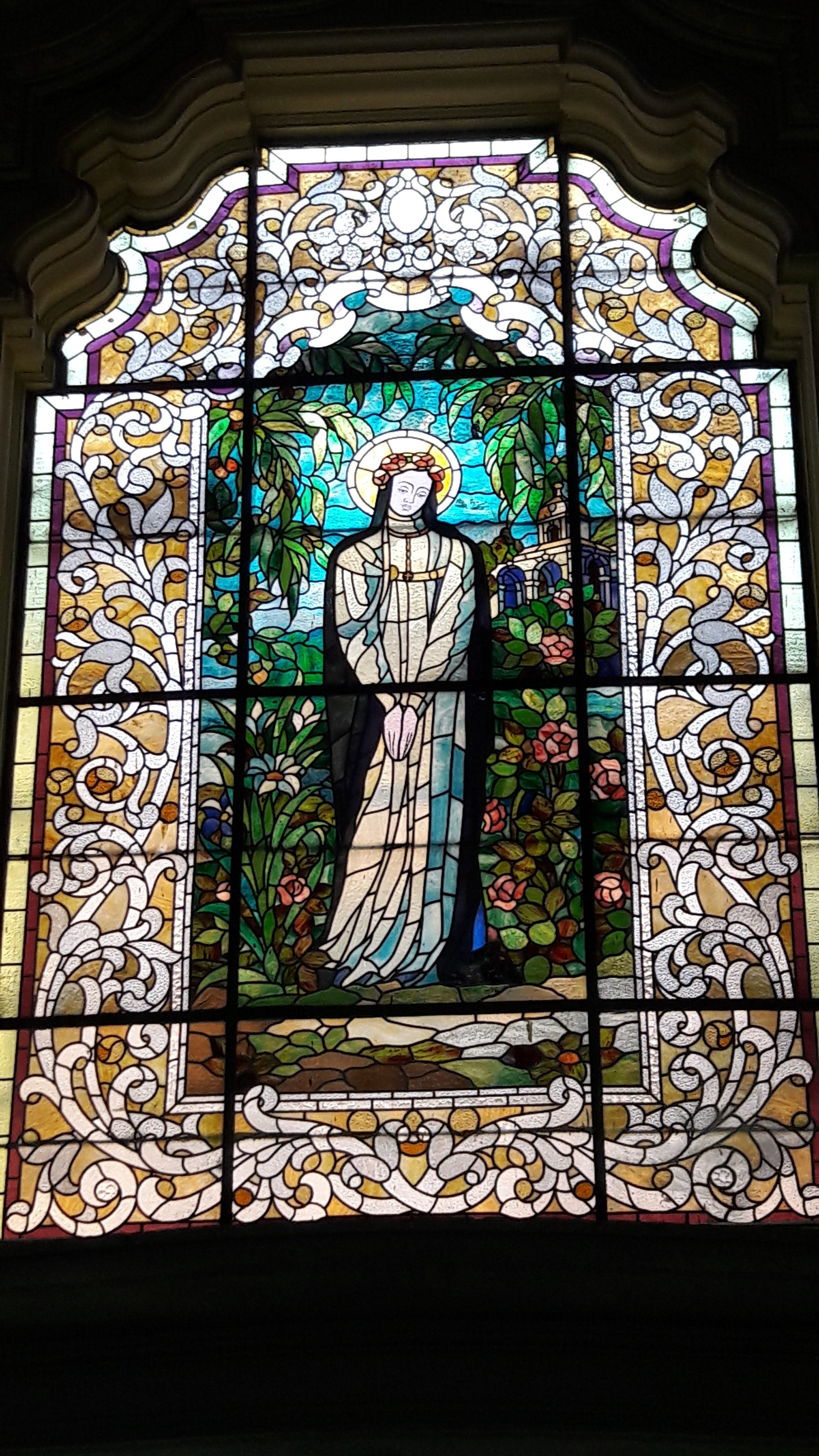 Hermoso vitral de Santa Rosa de Lima